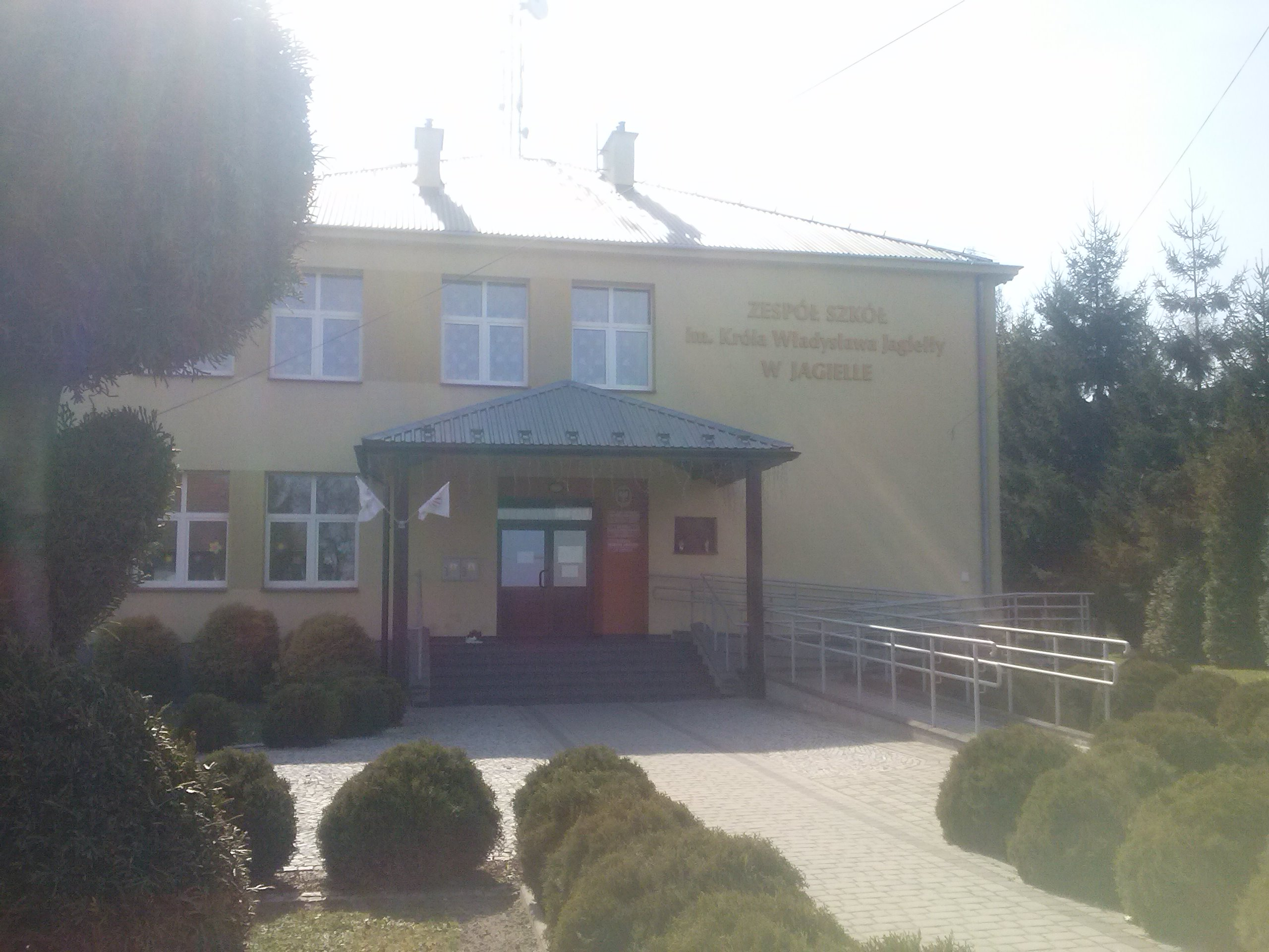 Szkoła podstawowa im. Króla Władysława Jagiełły w Jagielle.